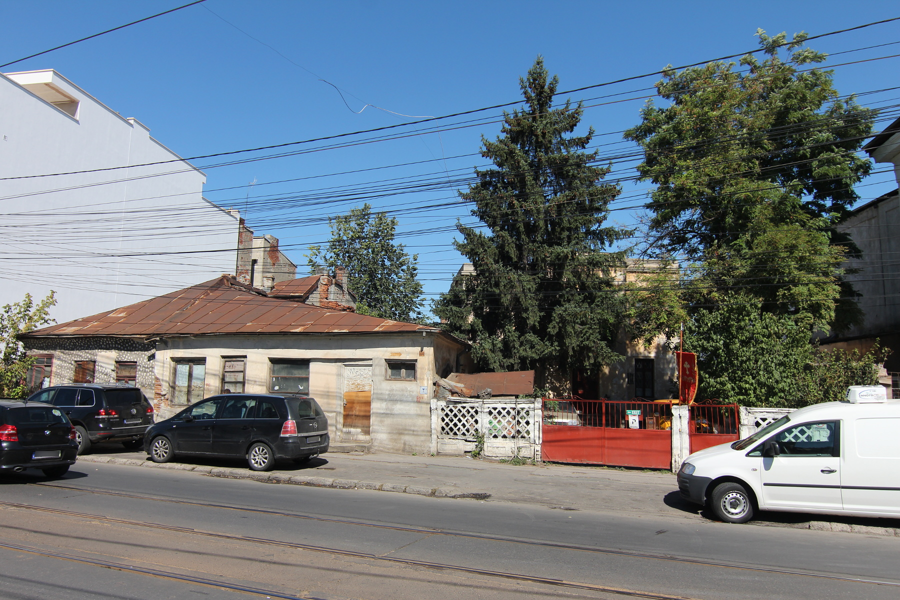 Imobil pe Calea Călărașilor